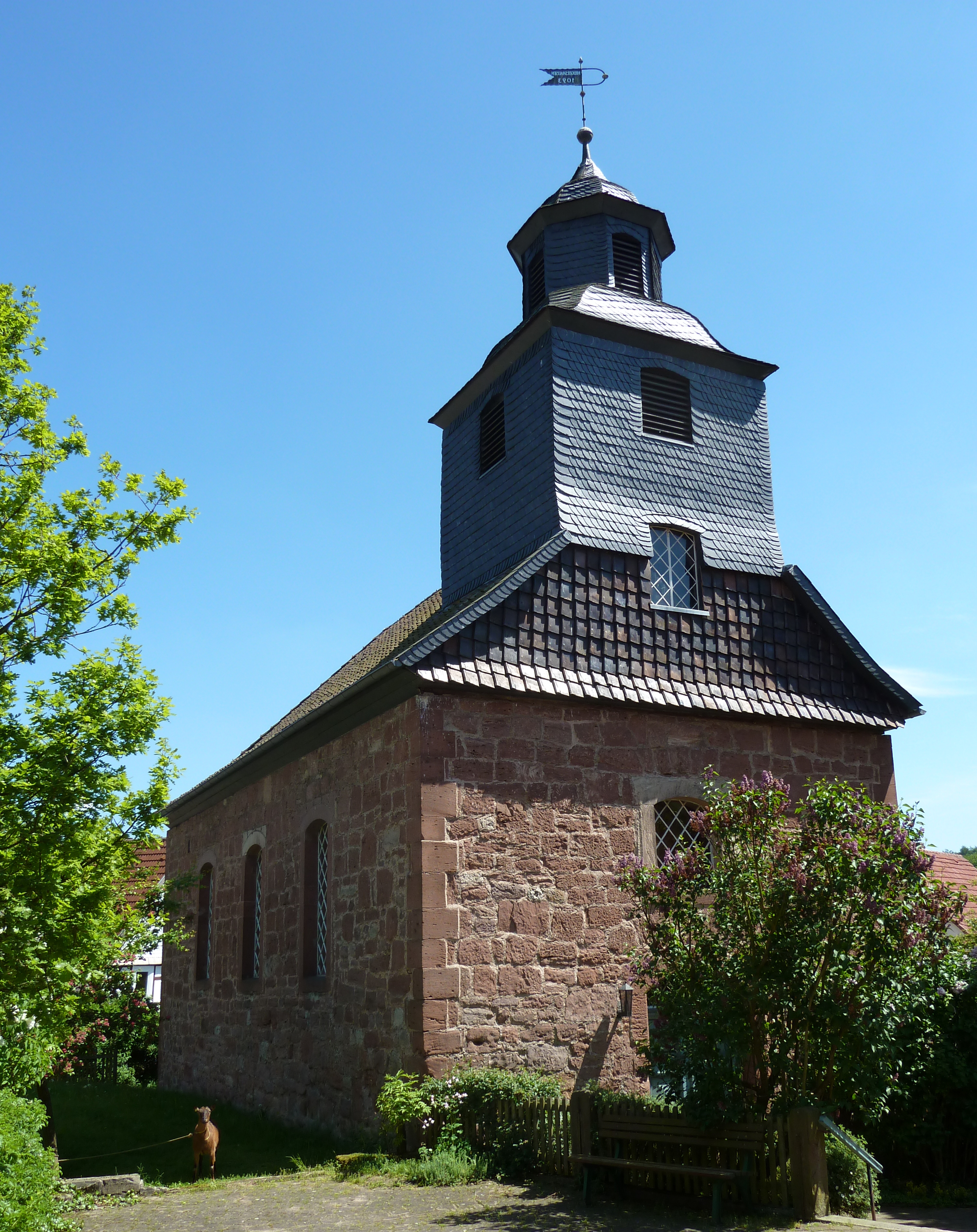 Ev. Kirche in Hilgershausen, Stadt Bad Sooden-Allendorf, Nordhessen